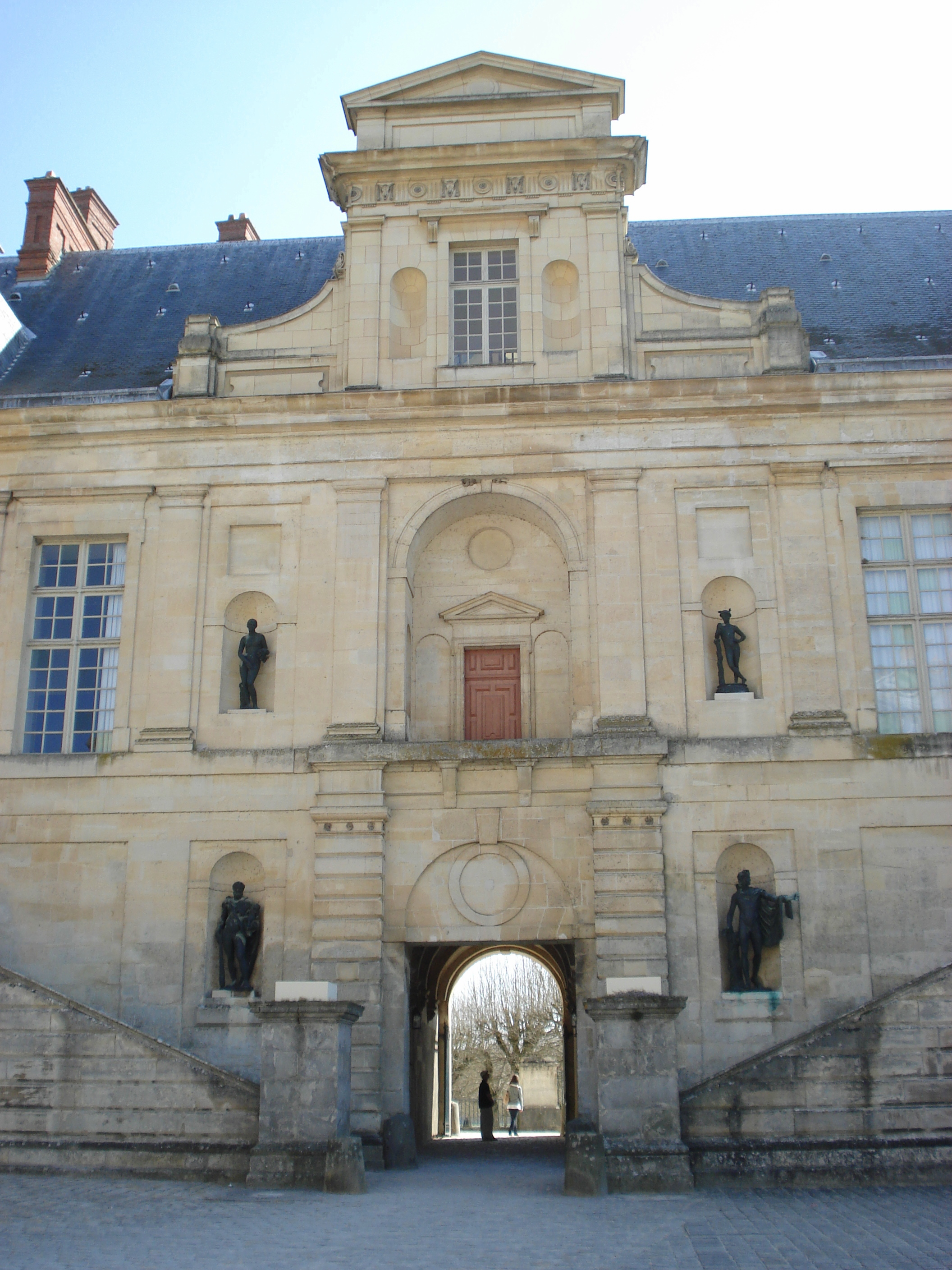 Schloss Fontainebleau, Flügel La Belle Cheminée